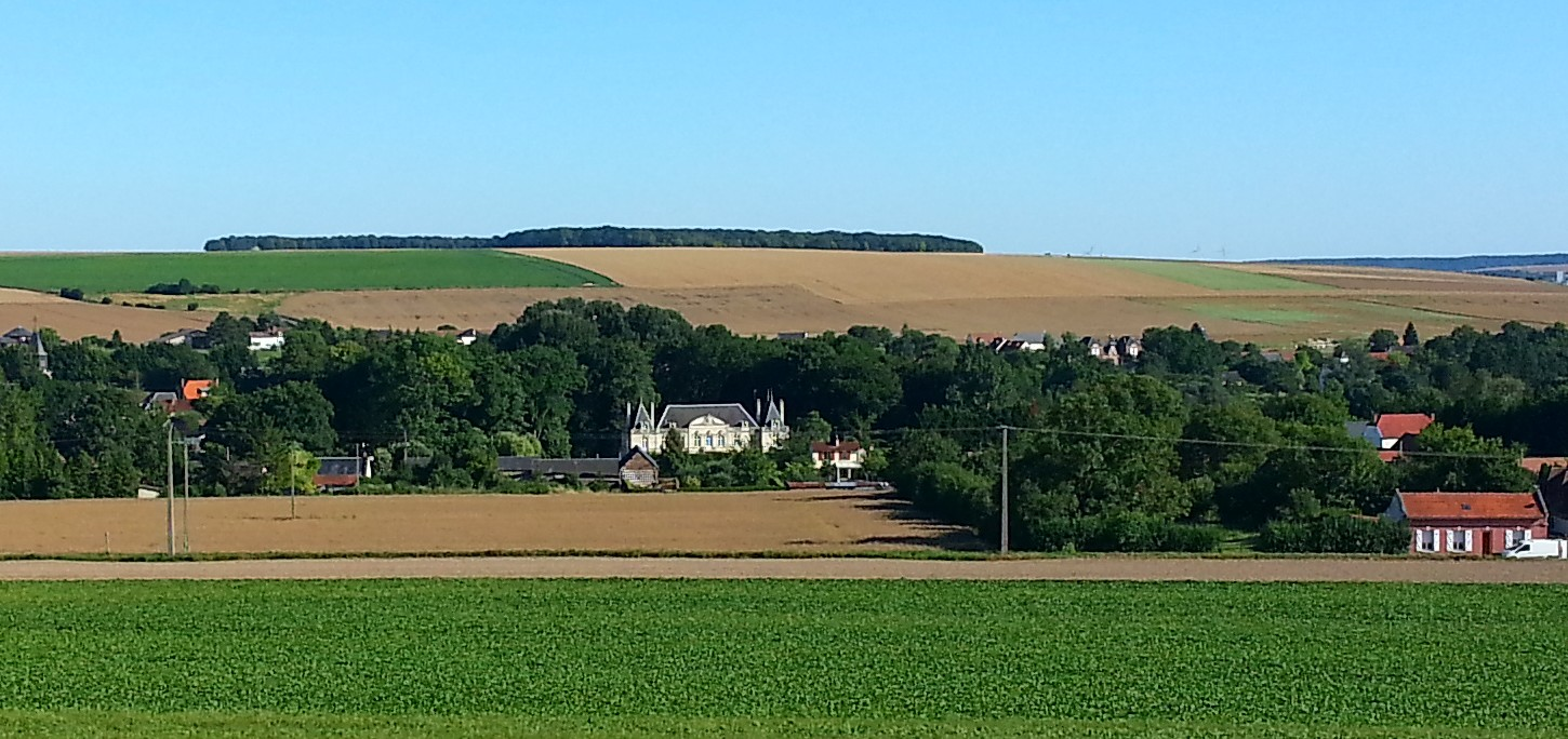 Vue prise depuis le plateau en direction de la vallée de la Luce